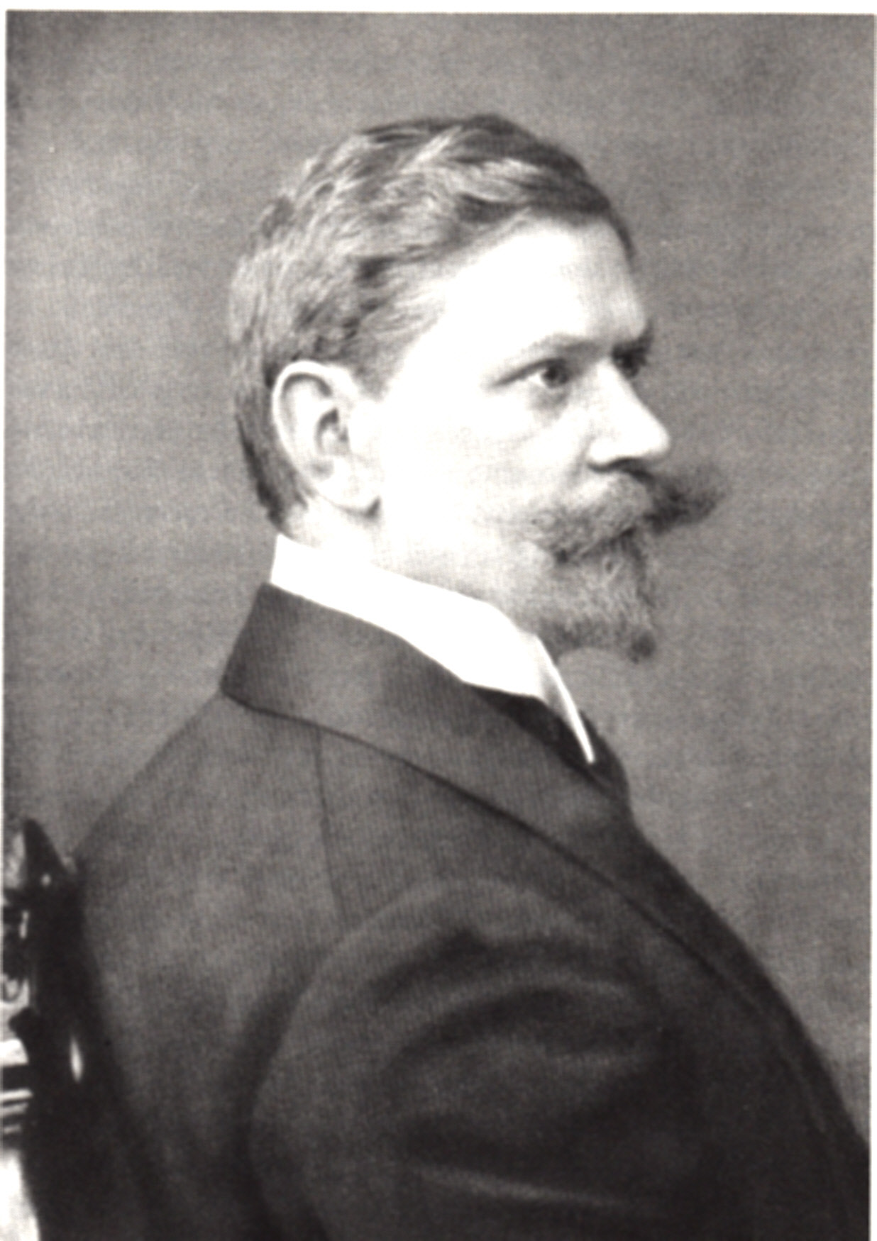 Fotografie von Alexander Tille. Erschienen in: Saarländische Lebensbilder, Band 4, Saarbrücken: Saarbrücker Druckerei und Verlag 1989, S. 157. Keine Angaben zu Fotograf und Entstehungsjahr.